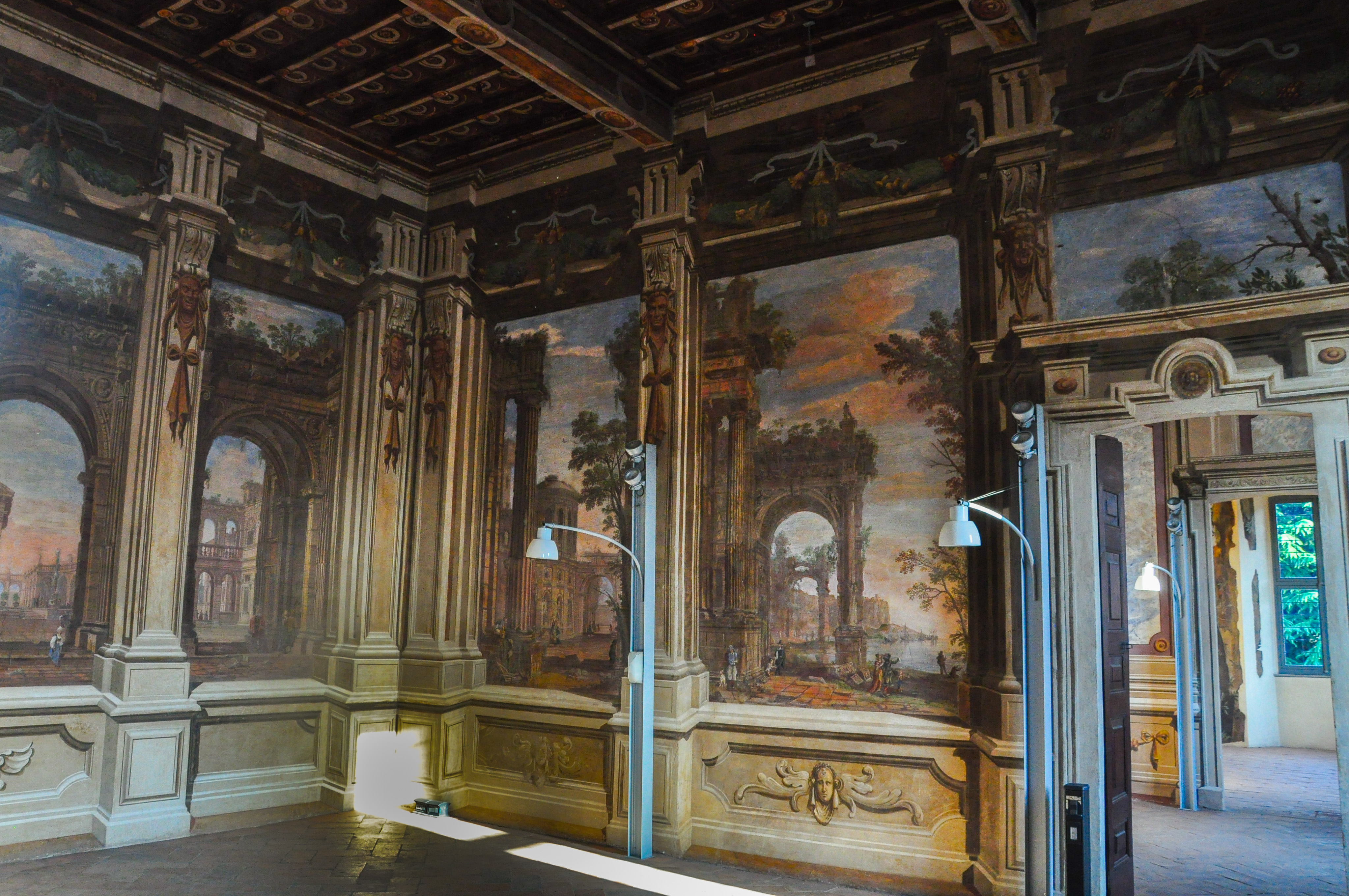 primo piano, affresco delle stanze